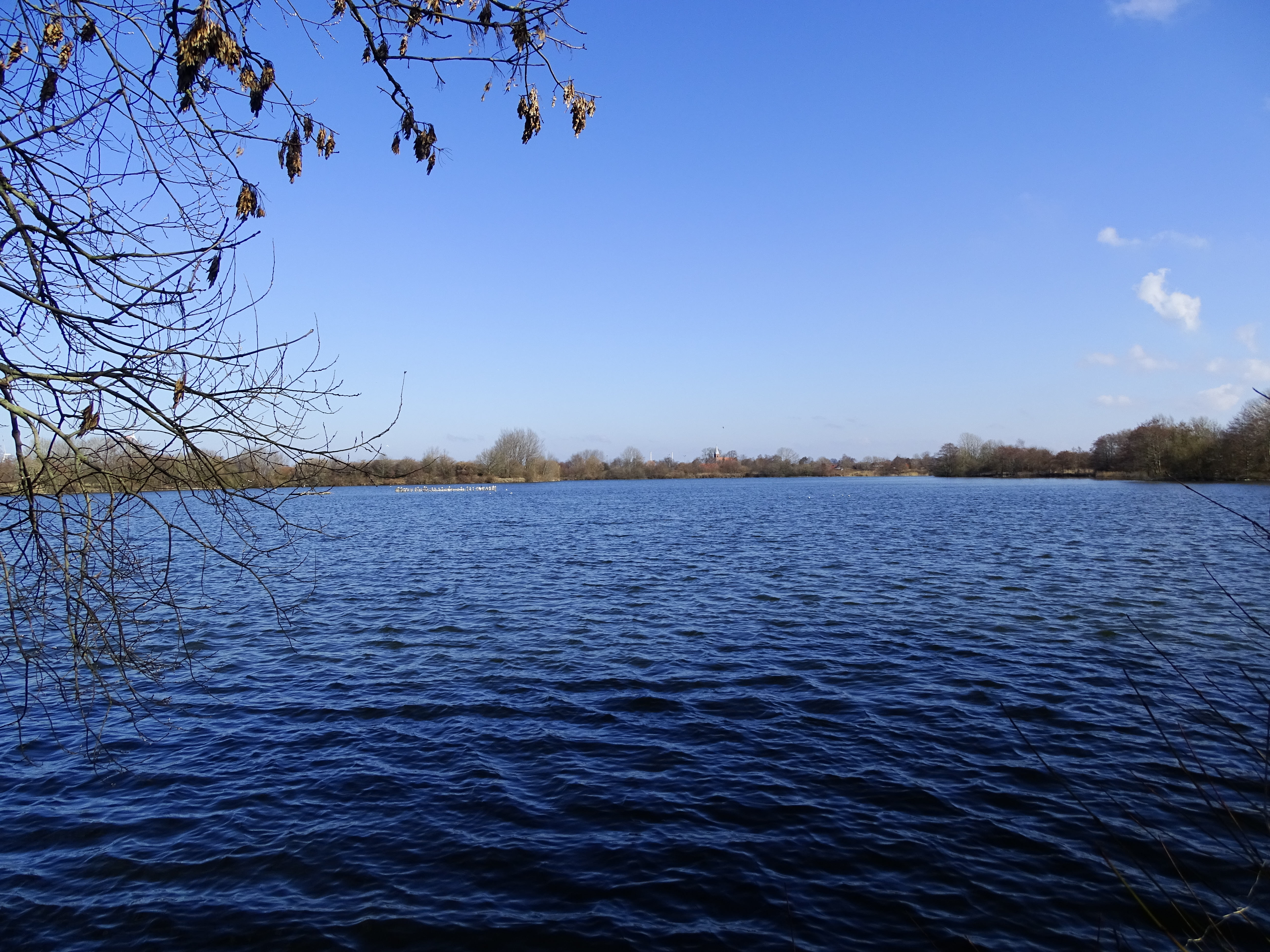 Teichfledermaus-Habitat "Barghauser See" bei Fedderwarden